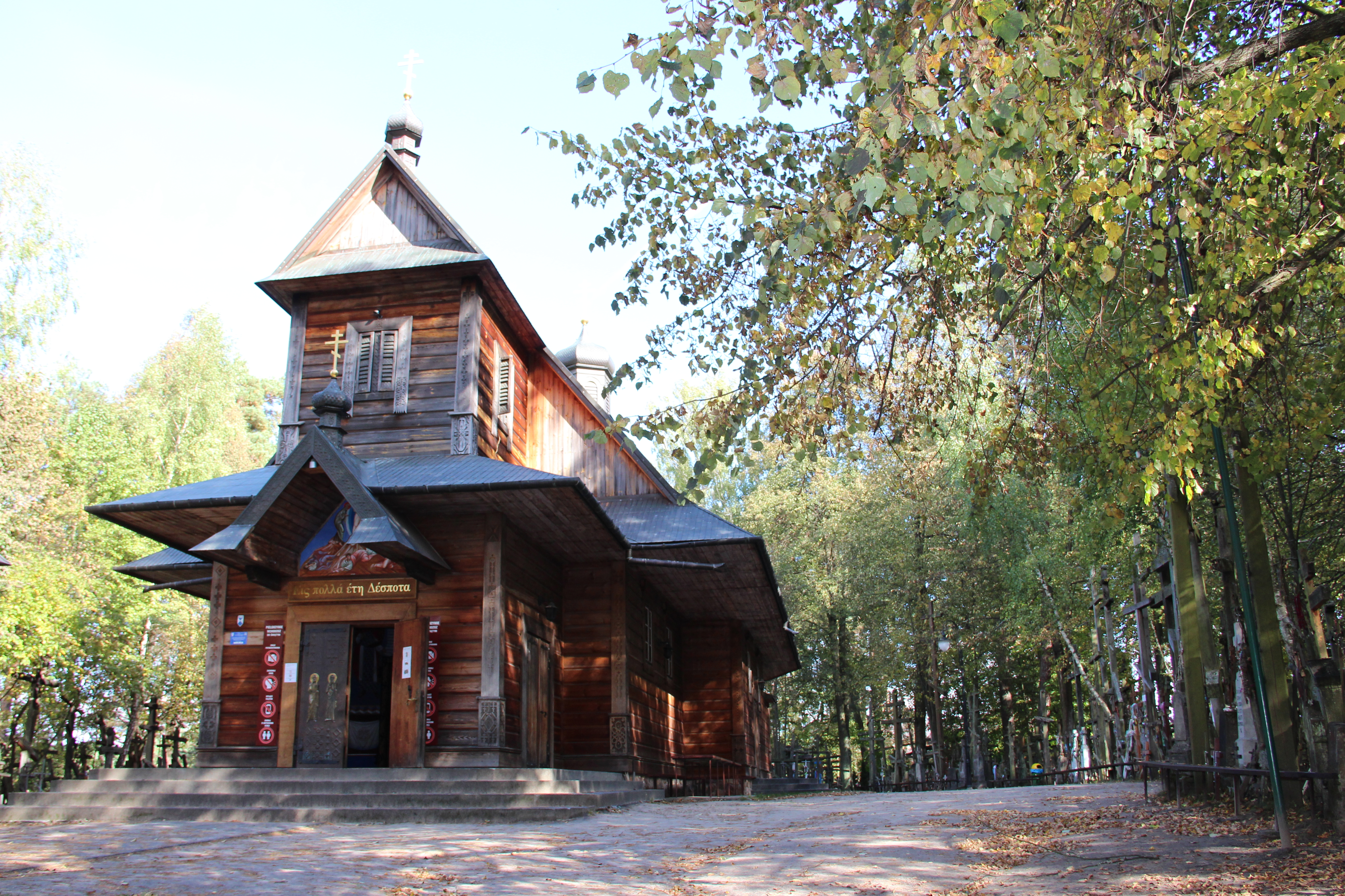 Prawosławne sanktuarium (Cerkiew Przemienienia Pańskiego) na Górze Grabarka w woj. podlaskim.